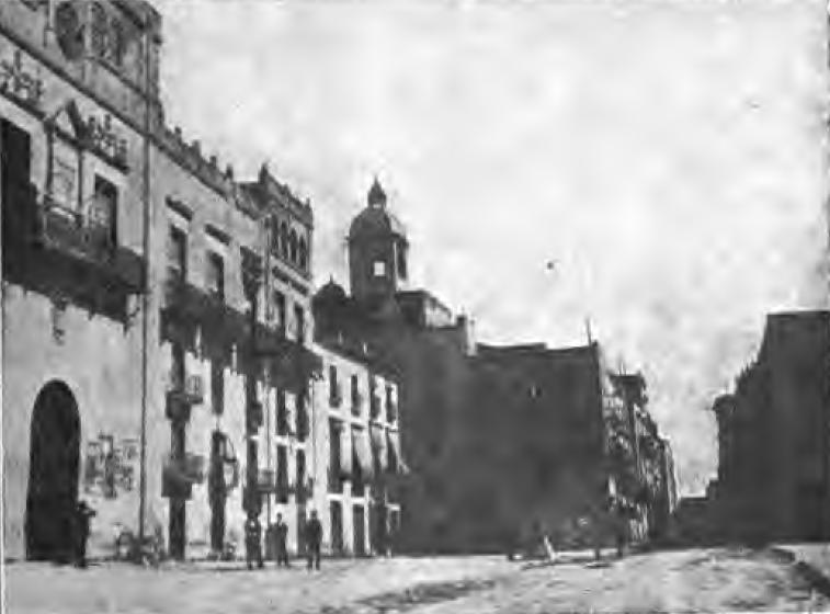 Elche: Plaza Mayor, casa del Ayuntamiento y calendario reloj árabe